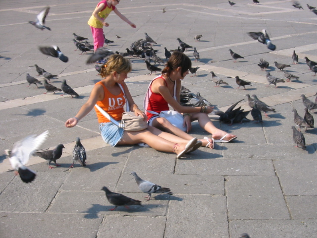 Pigeons sur la place Saint Marc de Venise